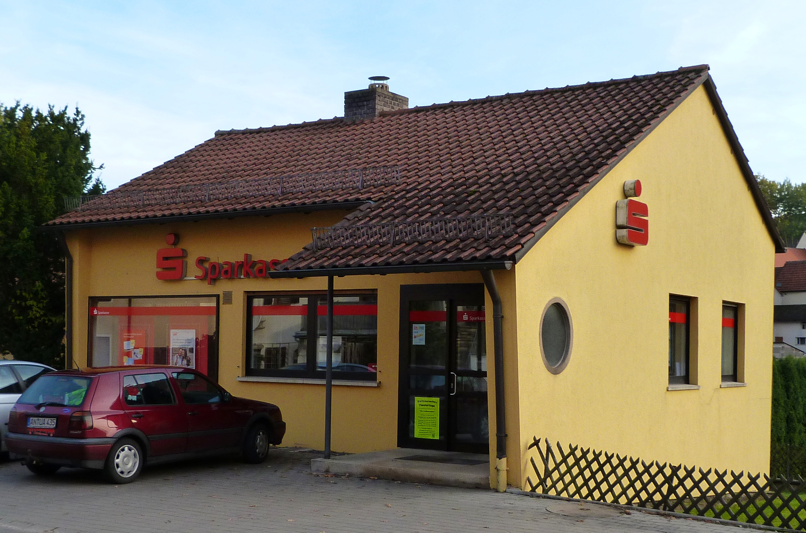 Sparkasse Veitsaurach